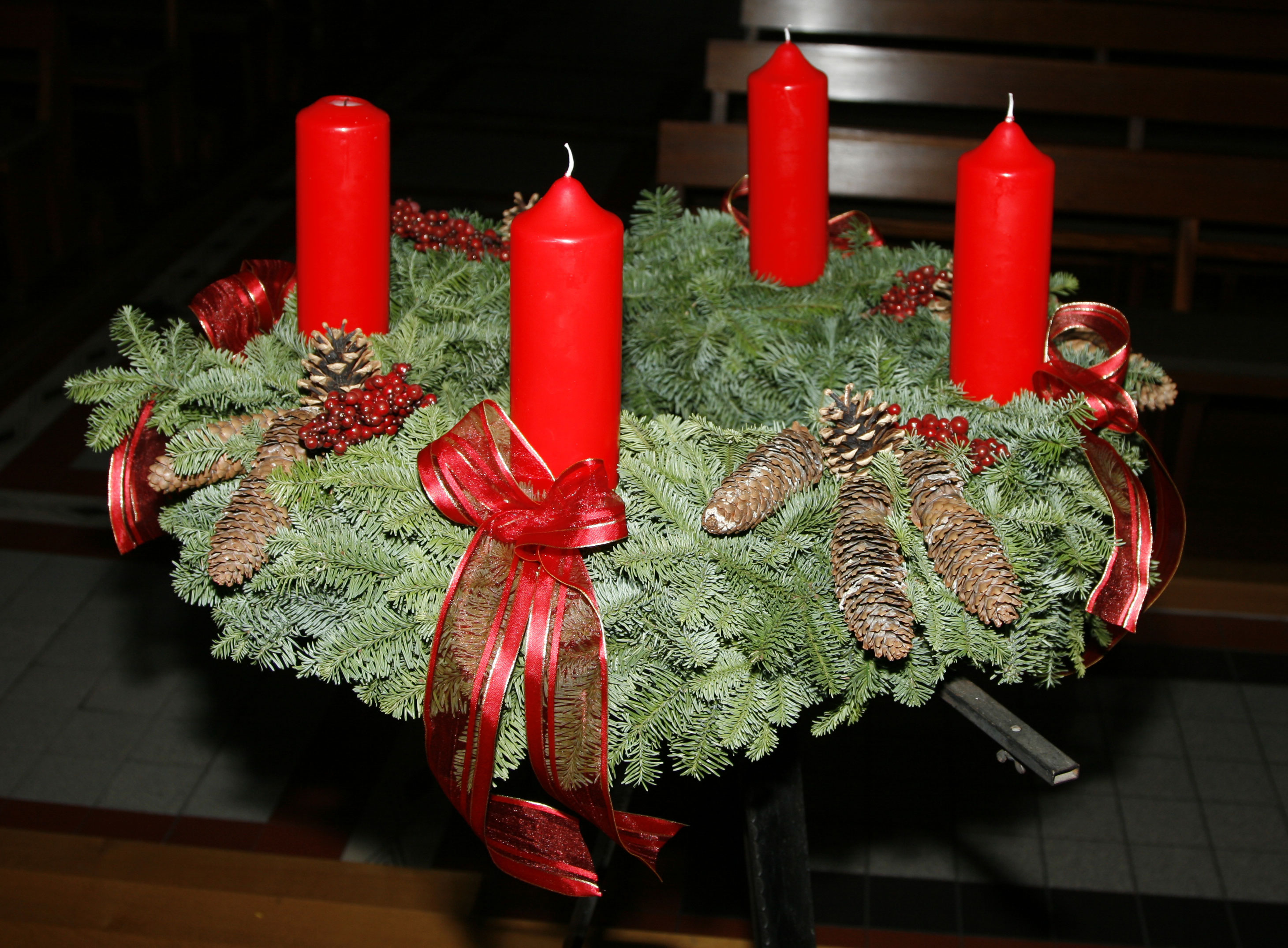 Adventskranz Kierch Wasserliesch